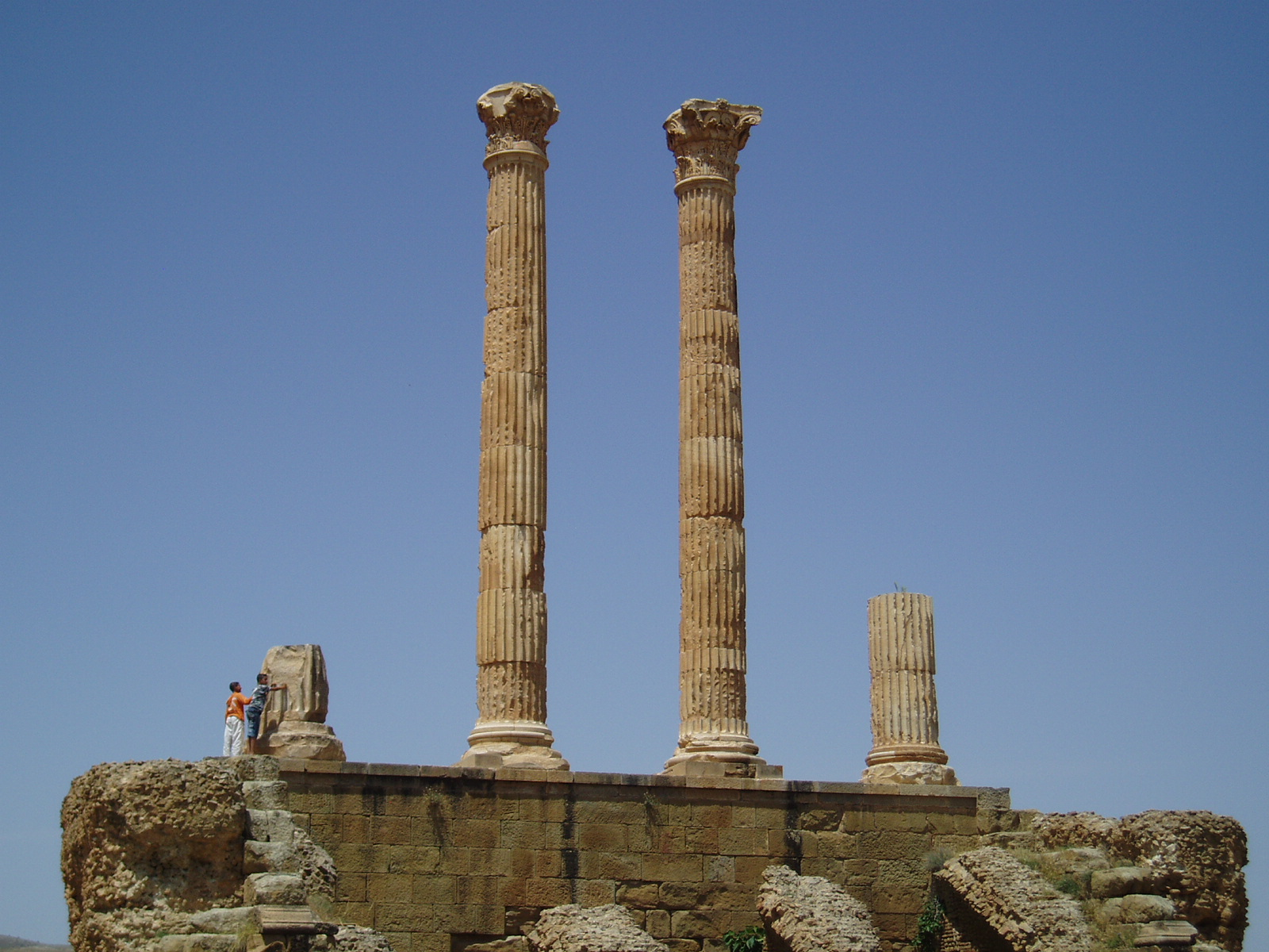 ruiny Kapitolu w Timgadzie